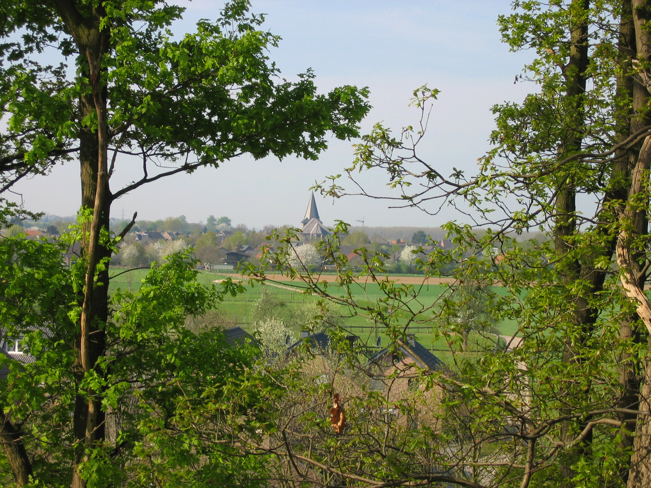 Kirche St. Gereon und Würm im April 2007, im Vordergrund Leiffarth (Geilenkirchen, Deutschland)